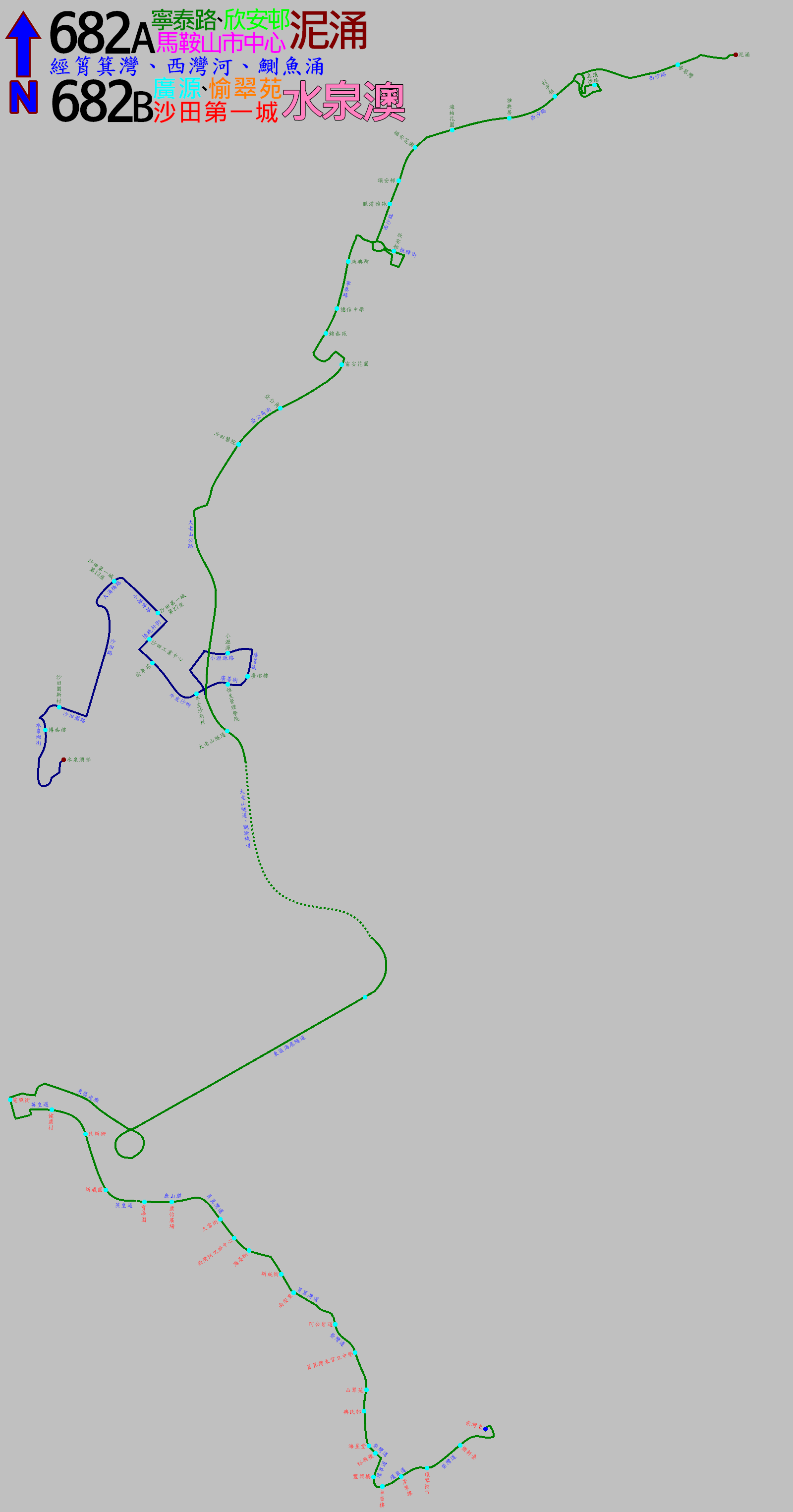 中文（香港）: 過海隧巴682A及682B線的走線圖，當中深藍色表示682B在沙田端的的走線